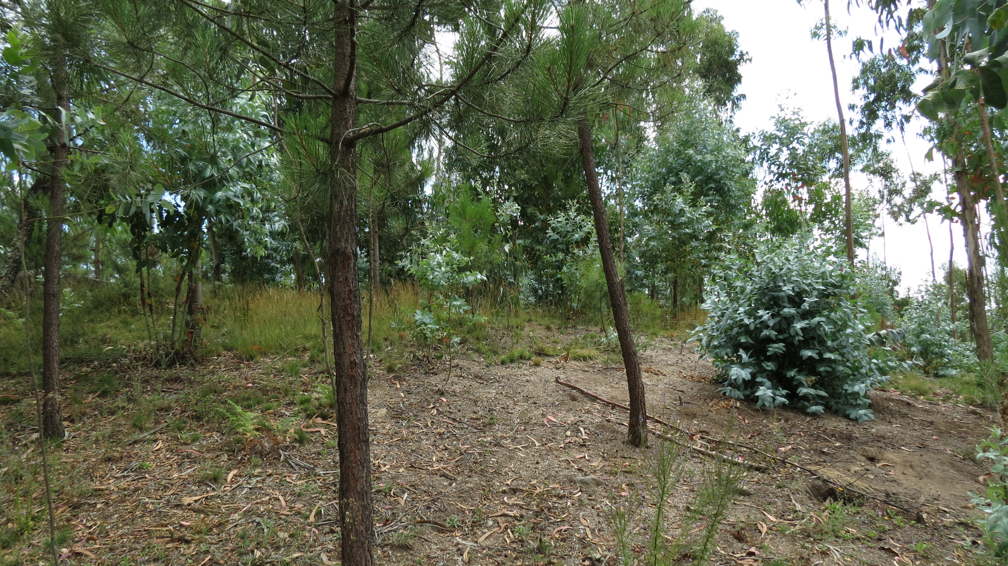 Mamoa da Anta do Padrão de Baltar.